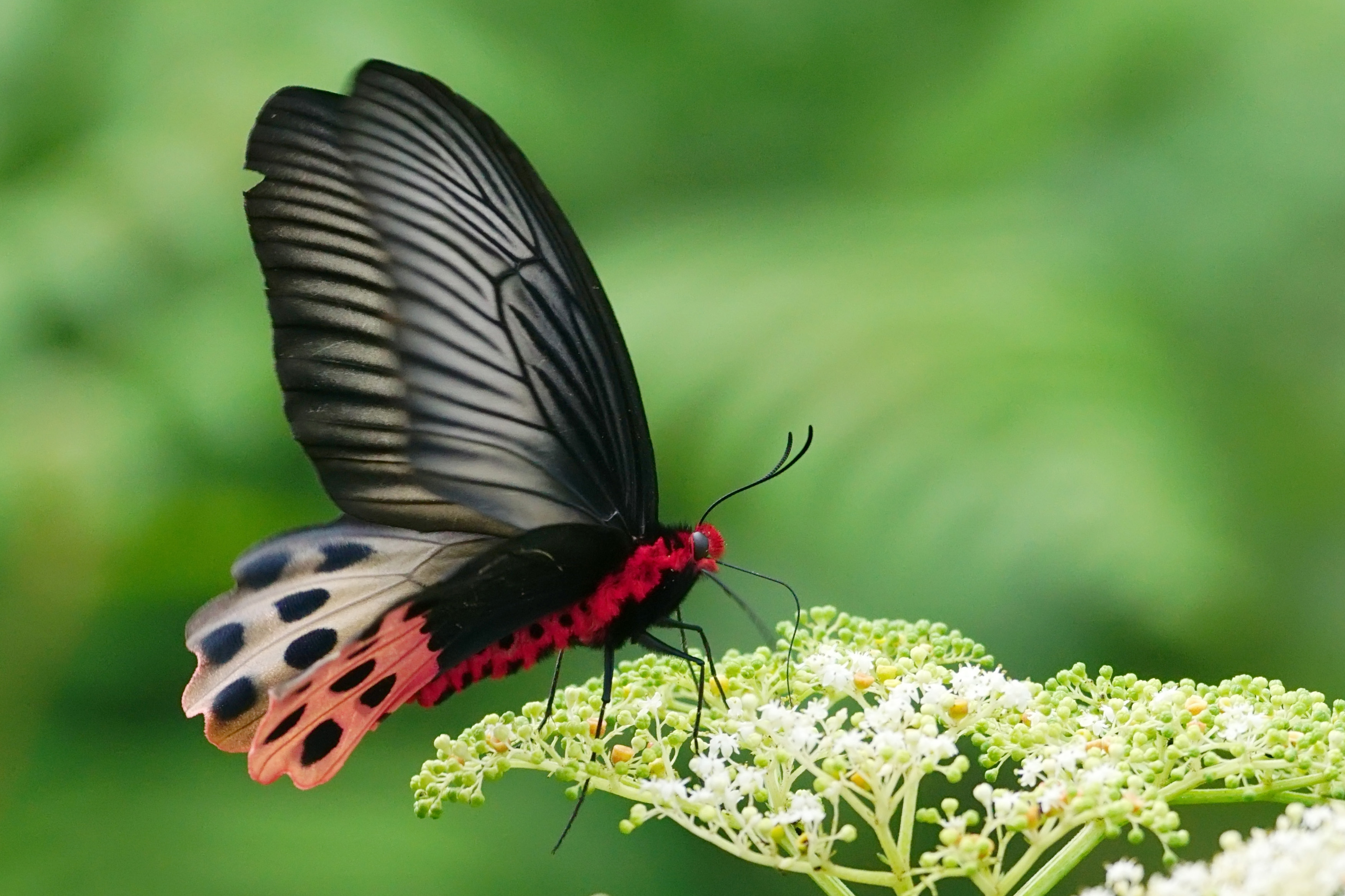 曙鳳蝶 Atrophaneura horishana 雌